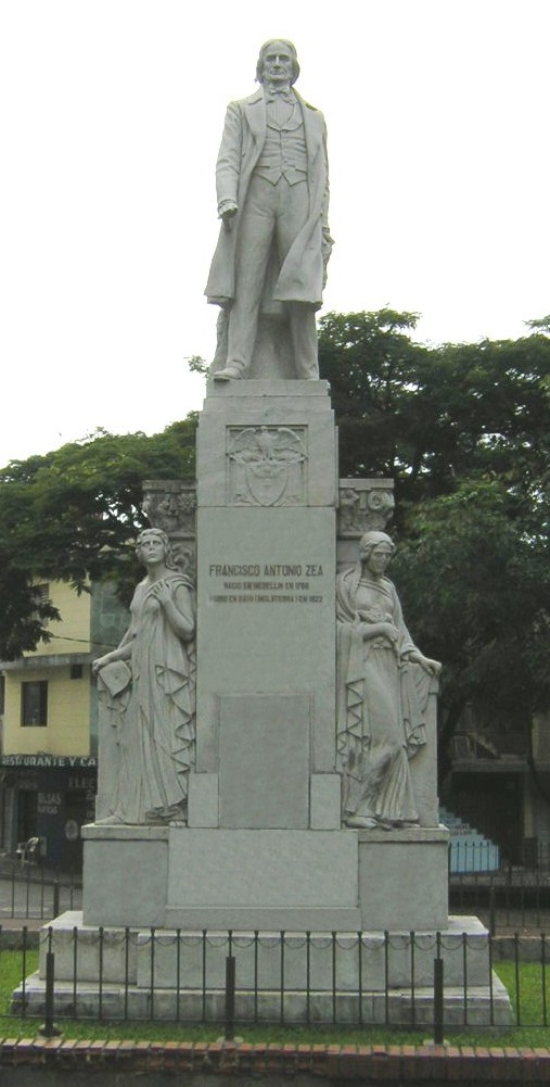 Estatua de Francisco Antonio Zea, ubicado en la Plazuela Zea, Medellín, Colombia